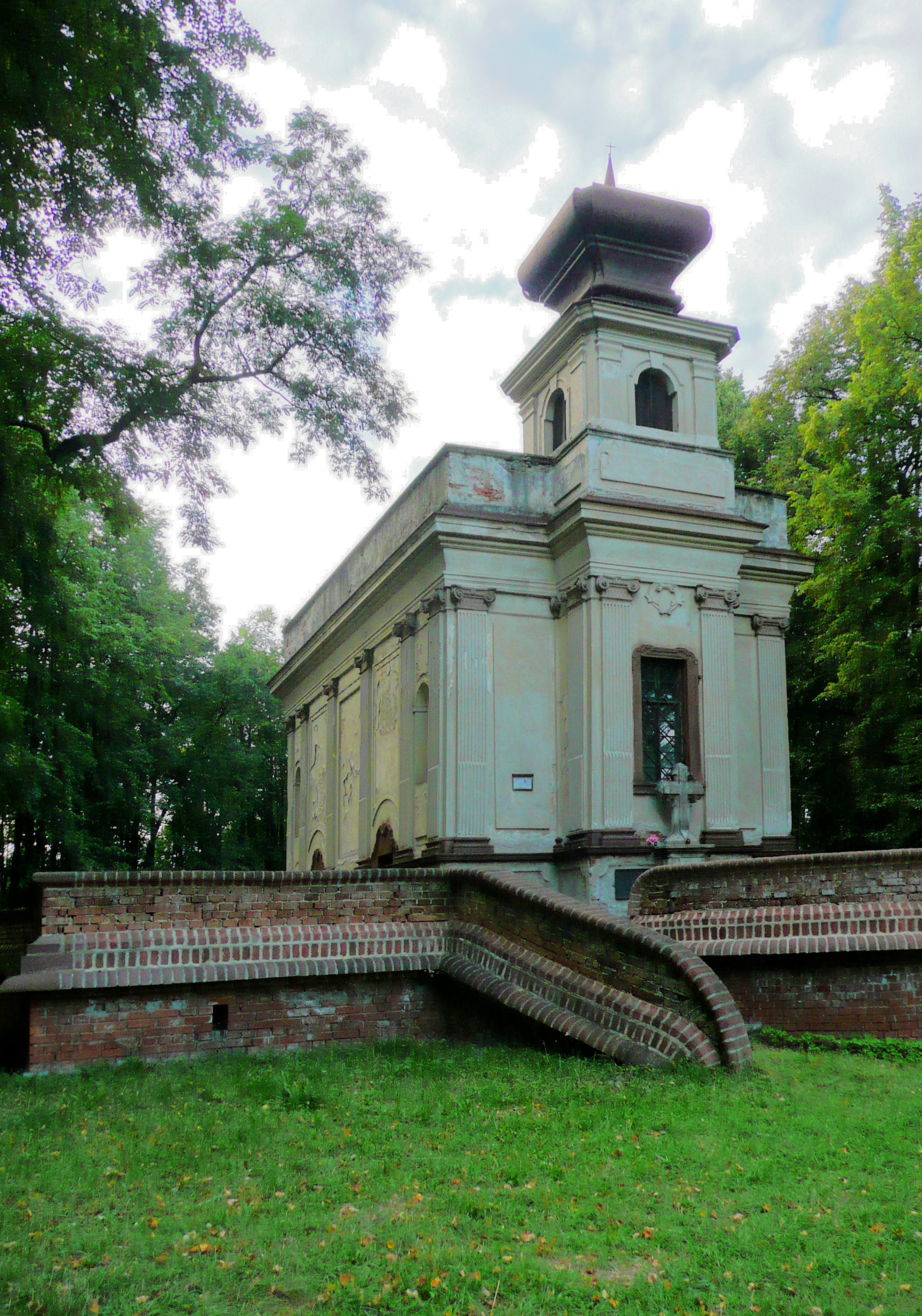 Loreta (Bolinka), na Spáleném vrchu jižně od silnice Vlašim-Bolina, Bolinka